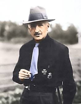 Arne Somersalo IKL:n väreihin pukeutuneena.